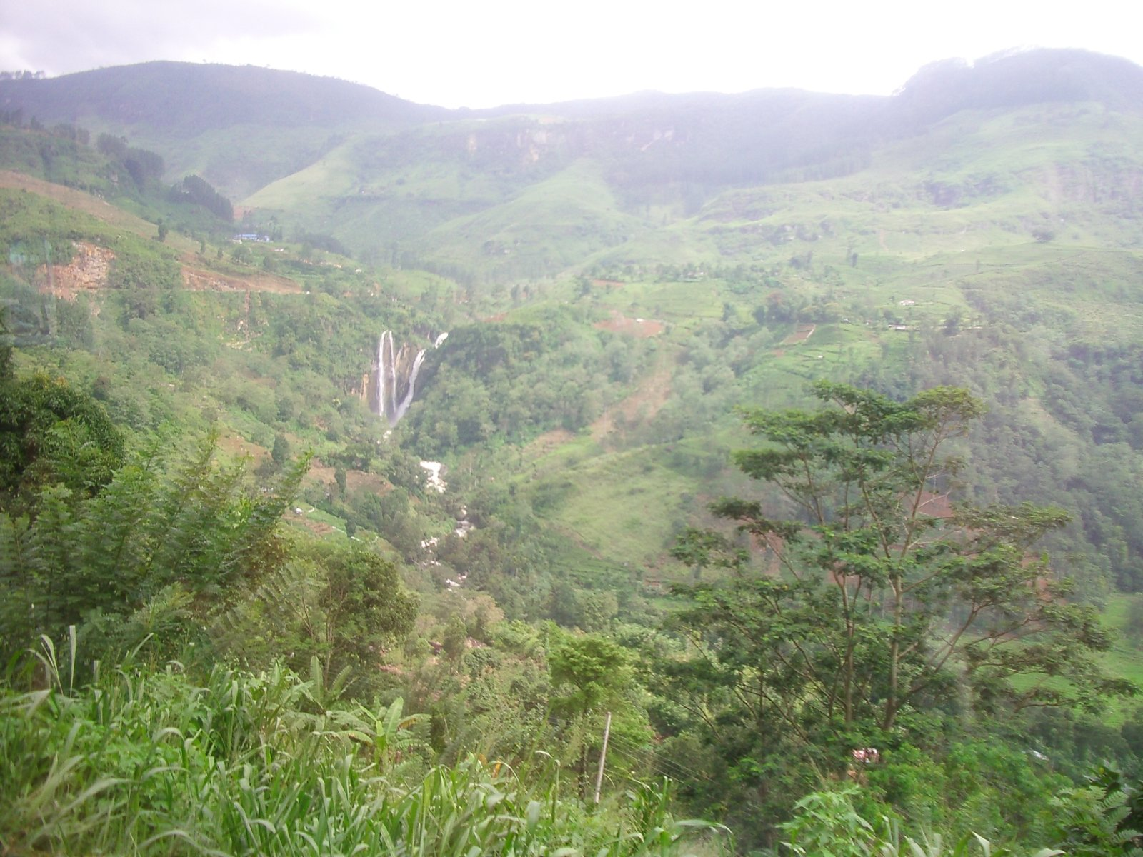 Central province, Sri Lanka, foto feta per J. Ollé el juliol del 2006